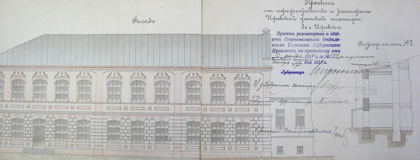 Праект прыбудовы да жаночай гімназіі ў Іжэўскім Заводзе Сарапульскага павета. 1912